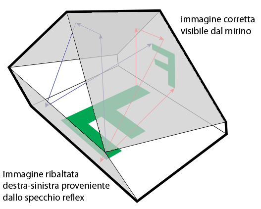 Schema di pentaspecchio a tetto (macchina fotografica reflex)